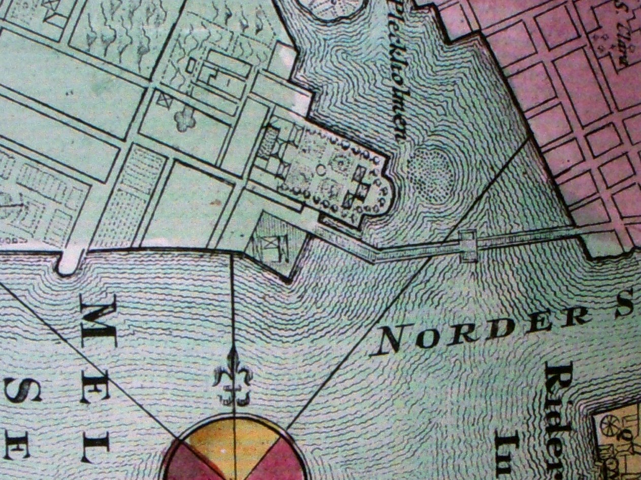 1724 års karta över Stockholm, del av östra Kungsholmen visande Gripenhielms malmgård